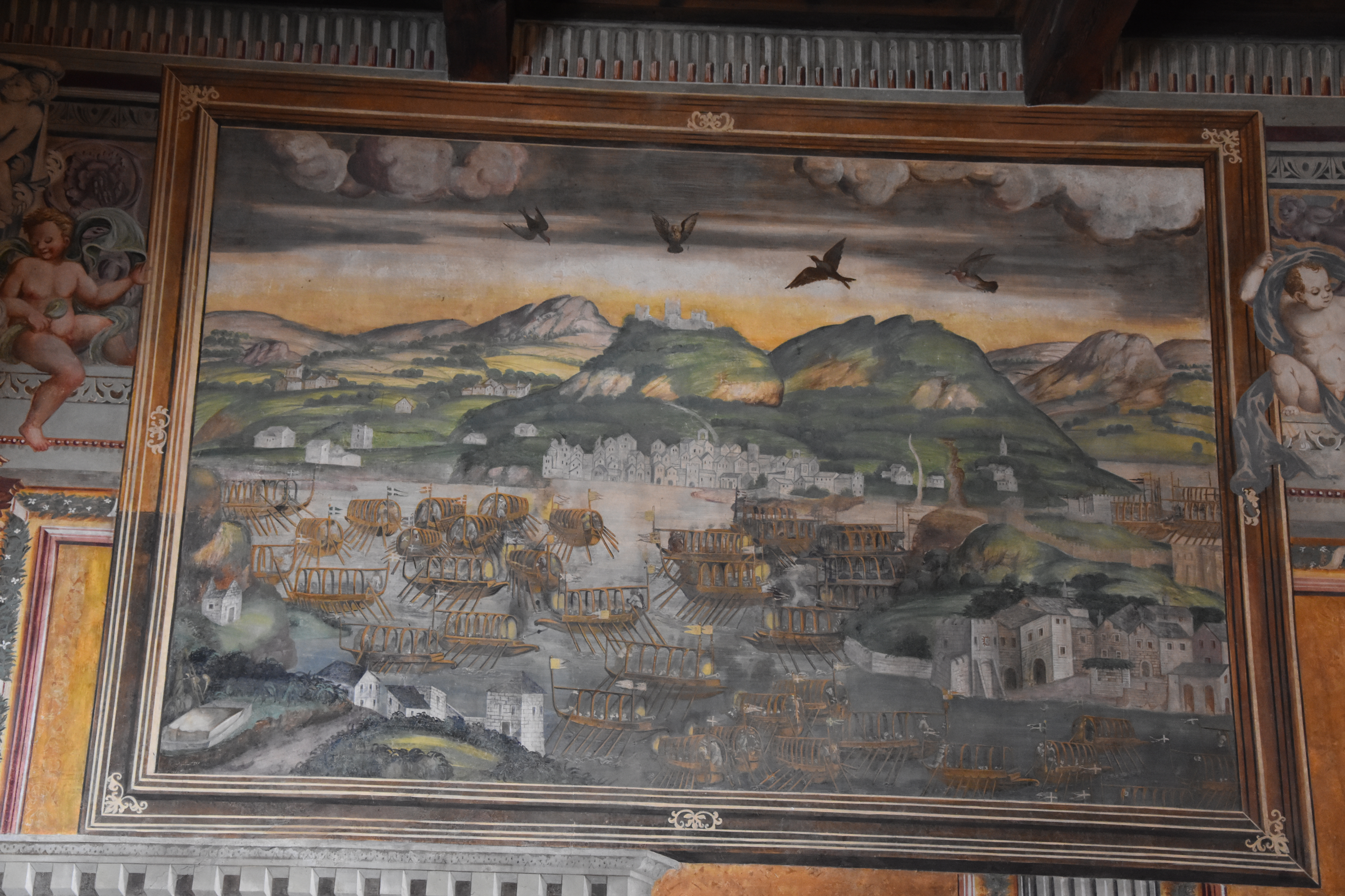 Castello di Melegnano, sala delle battaglie, affreschi cinquecenteschi.